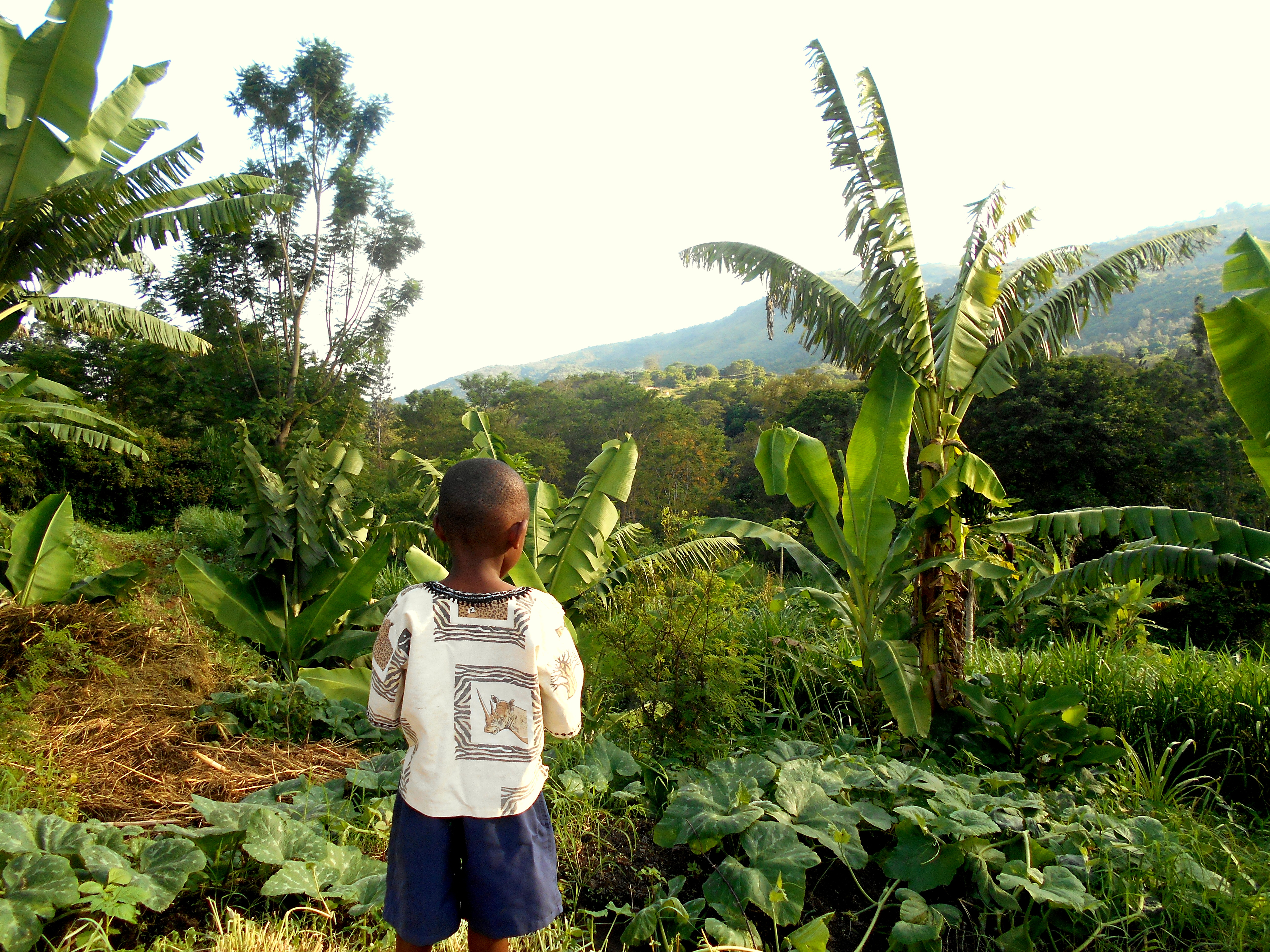 A Szent József Gyermekotthon kertje Bura Mission faluban, Coast, Kenya